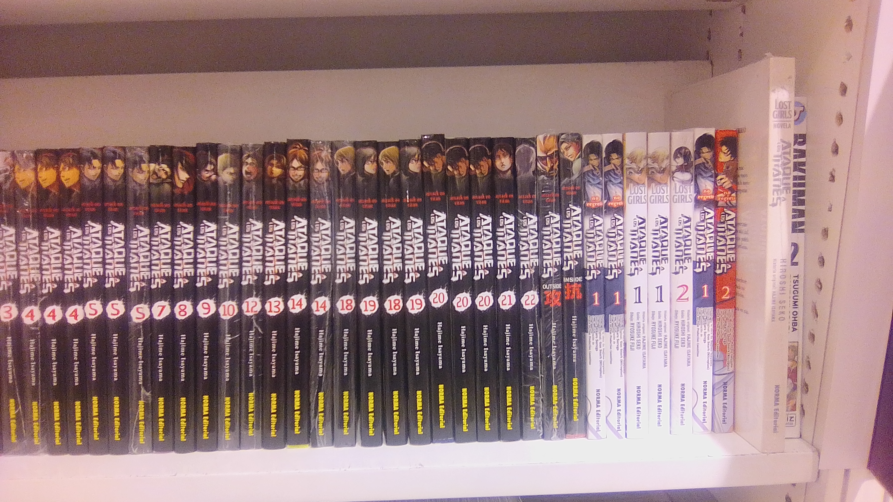 Tomos del manga de Ataque a los Titanes y sus spin-off publicados por la editorial Norma, recopilados en una estantería. A la derecha se puede observar la novela Lost Girls, también publicada por Norma.